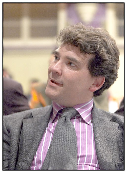 Arnaud Montebourg lors du Banquet Républicain du Nouveau Parti Socialiste le 21/04/2005.